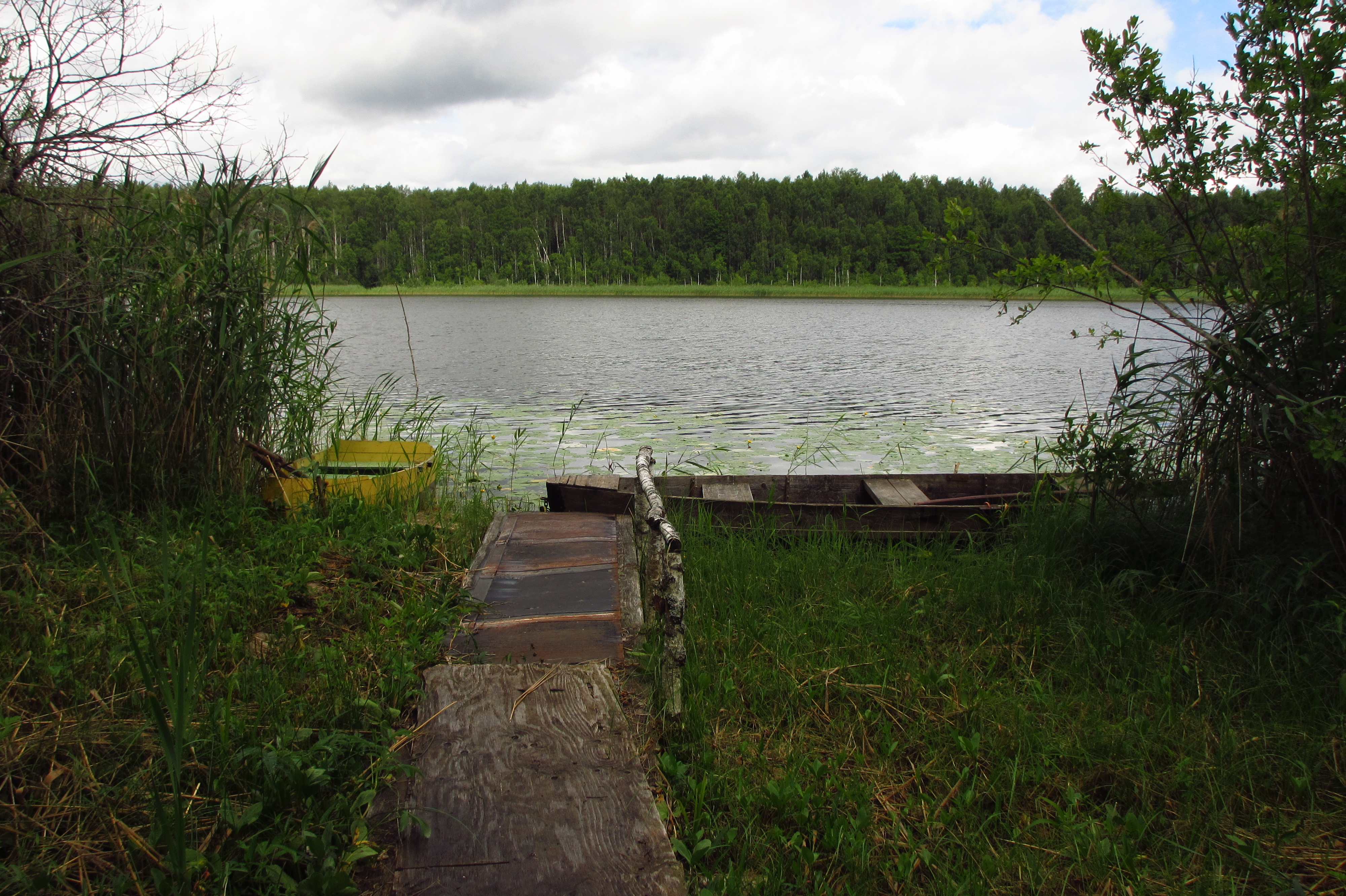 Väike Karujärv Nõo vallas